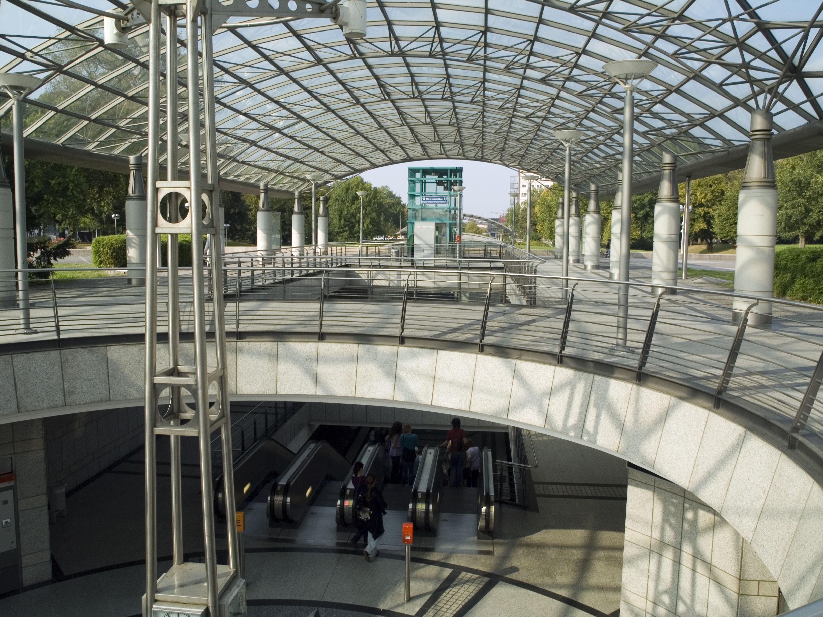 Северный Рейн - Вестфалия, Дортмунд - станция метрополитена Westfalenhallen